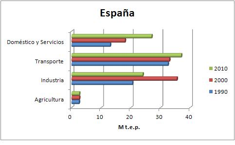 Evolución sectorial del consumo energético final en España. Fuente: Eurostat